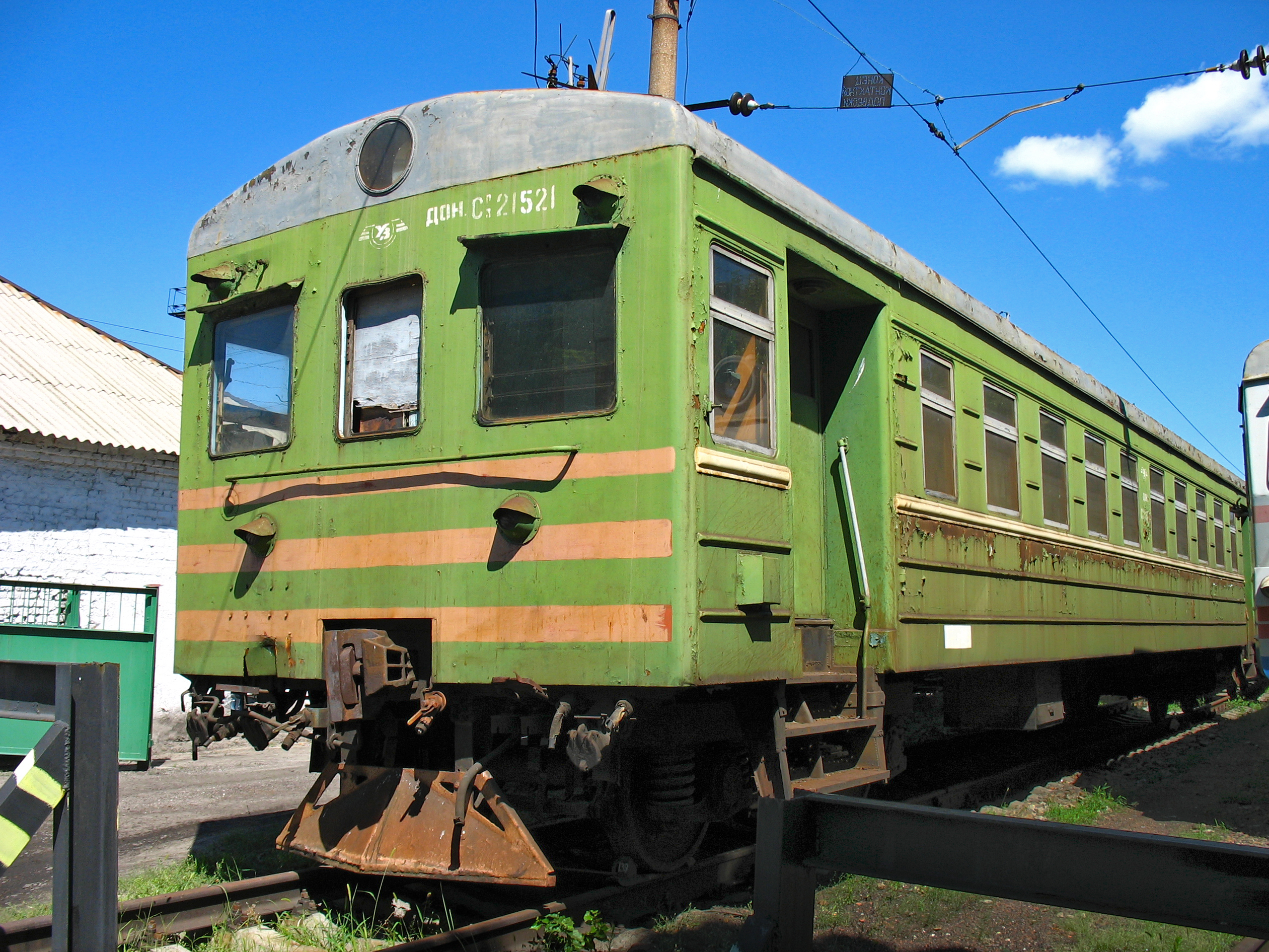 Электросекция СР3-1521 постройки 1956-го года